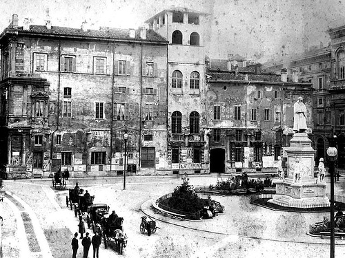 Palazzo Marino (Milano), facciata su piazza scala nell'ottocento prima dei rifacimenti